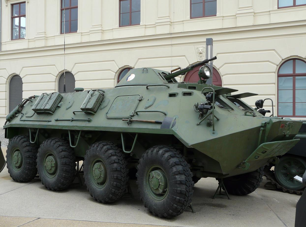 Schützenpanzerwagen (SPW), schwimmfähig, aus sowjetischer Produktion, Typenbezeichnung: BTR-60PB. Besonderheit: Standardausrüstung der mot. Schützentruppen der Nationalen Volksarmee der DDR Ausstellungsstück: Militärhistorisches Museum Dresden.